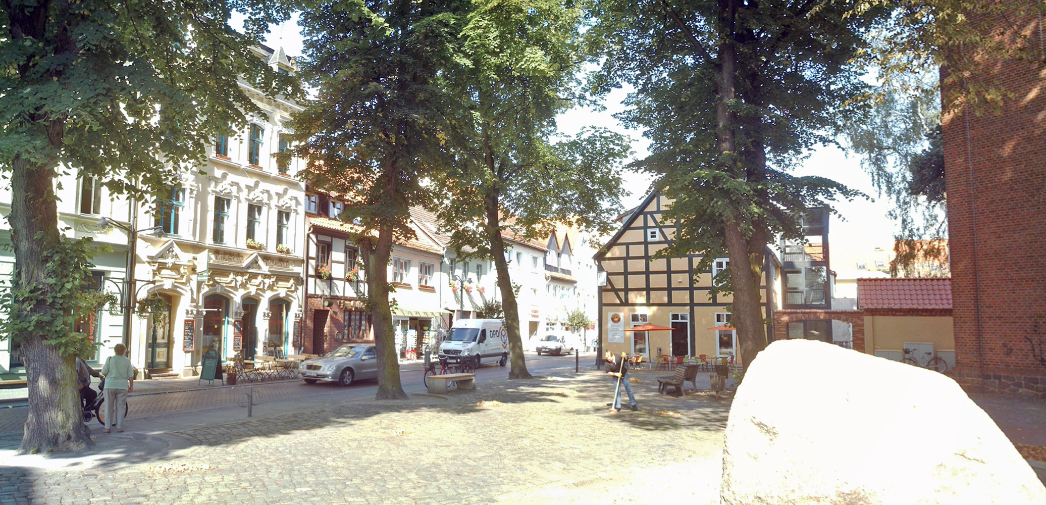 Platz vor der Marienkirche